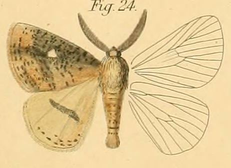 Chrysopoloma rudis (Walker, 1865)